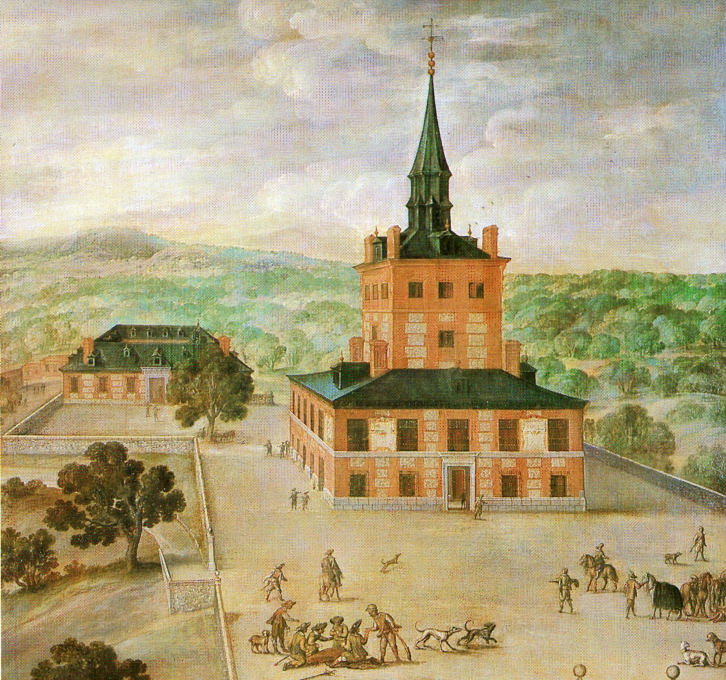 detail